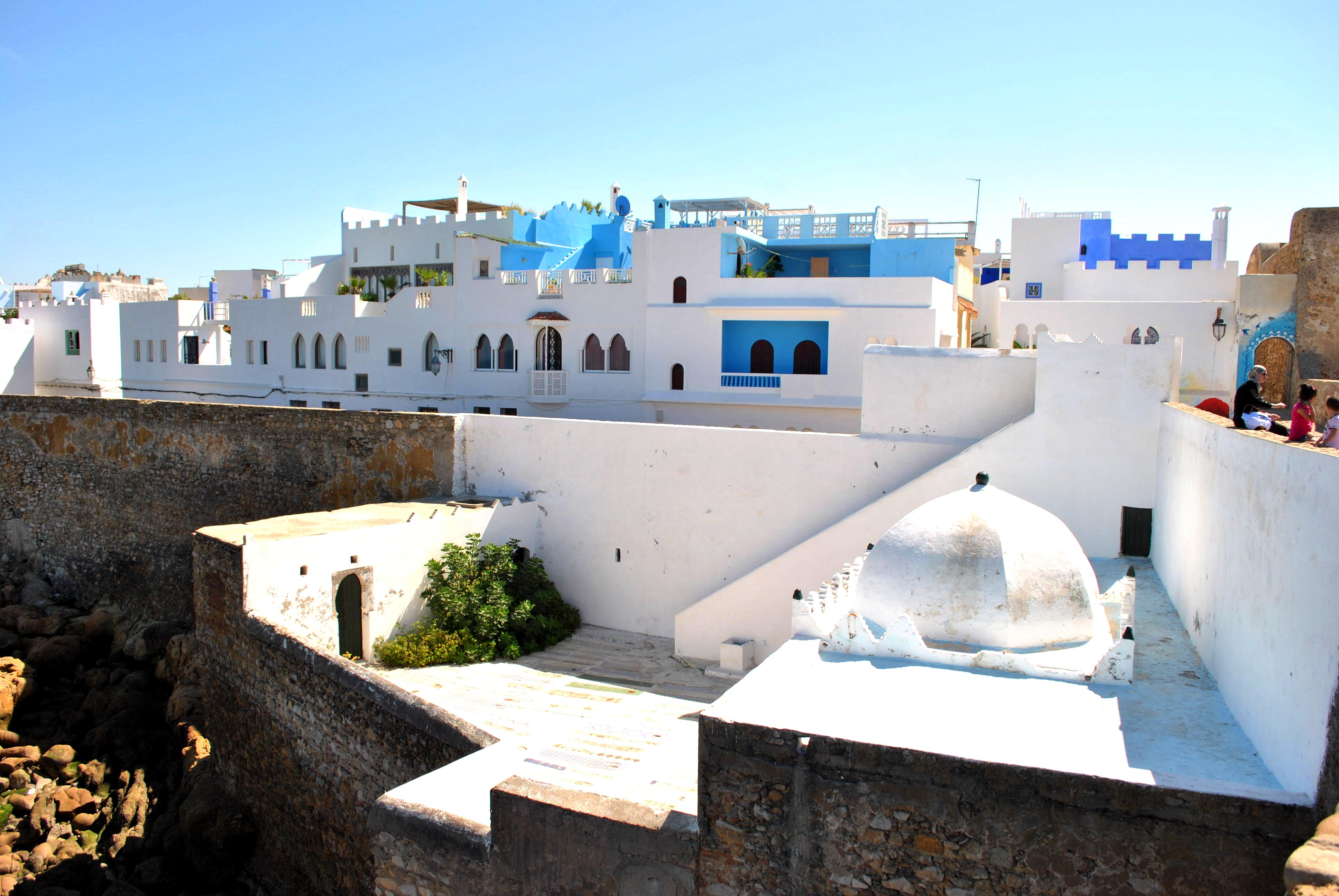 Mausolée en front de mer